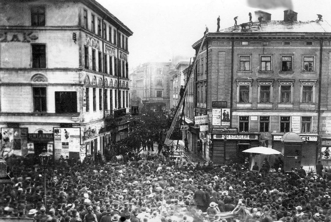 Львів, пл.Осьмомисла